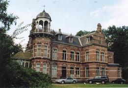 Zionsburg enkele jaren voor de fatale brand